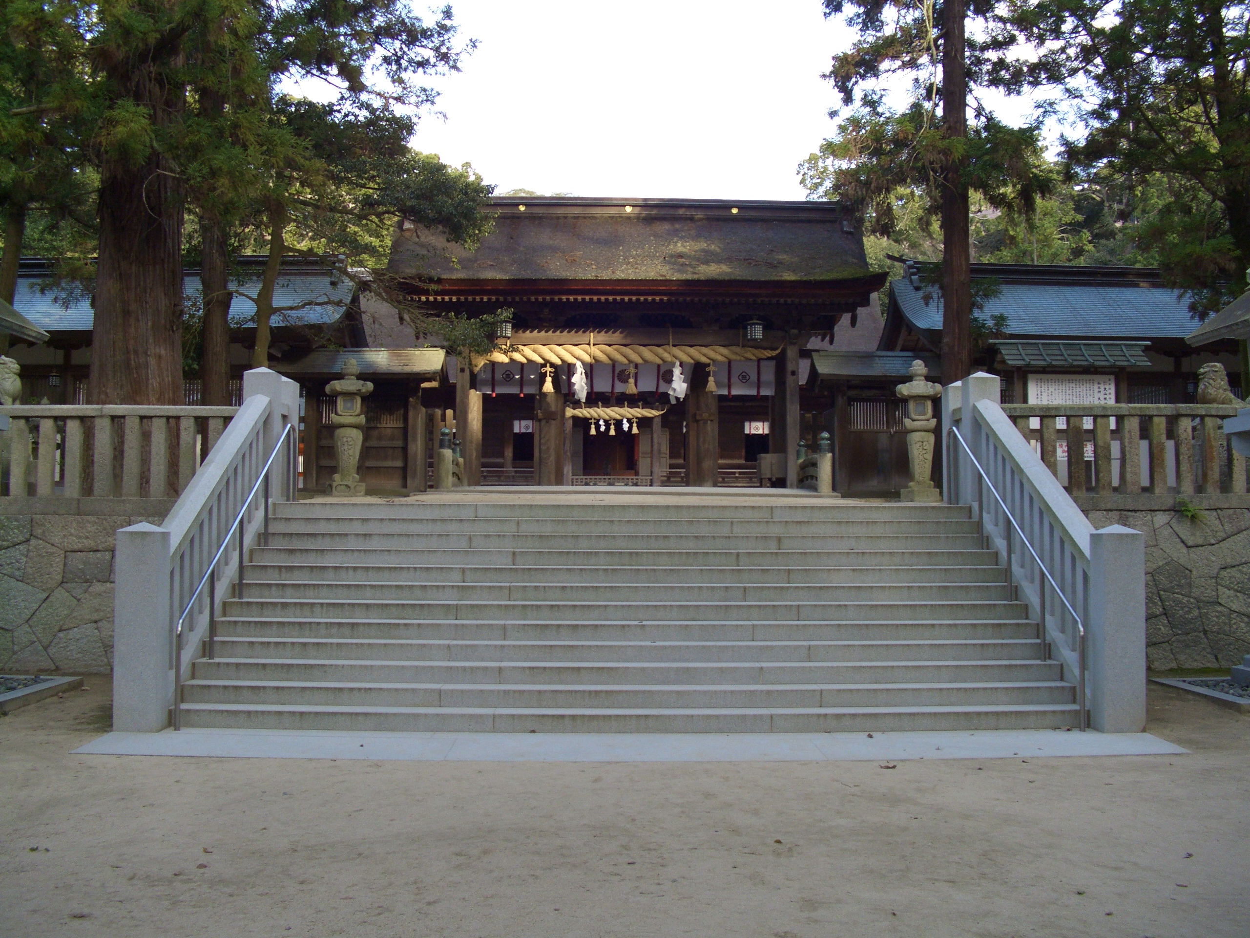 大山祇神社の神門